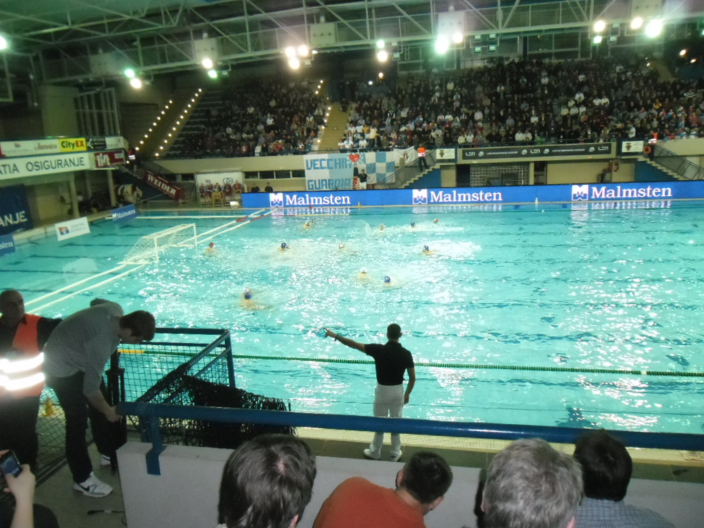 prizor iz vaterpolske euroligaške utakmice Jug - Pro Recco (8:7) u Dubrovniku 29. siječnja 2014.